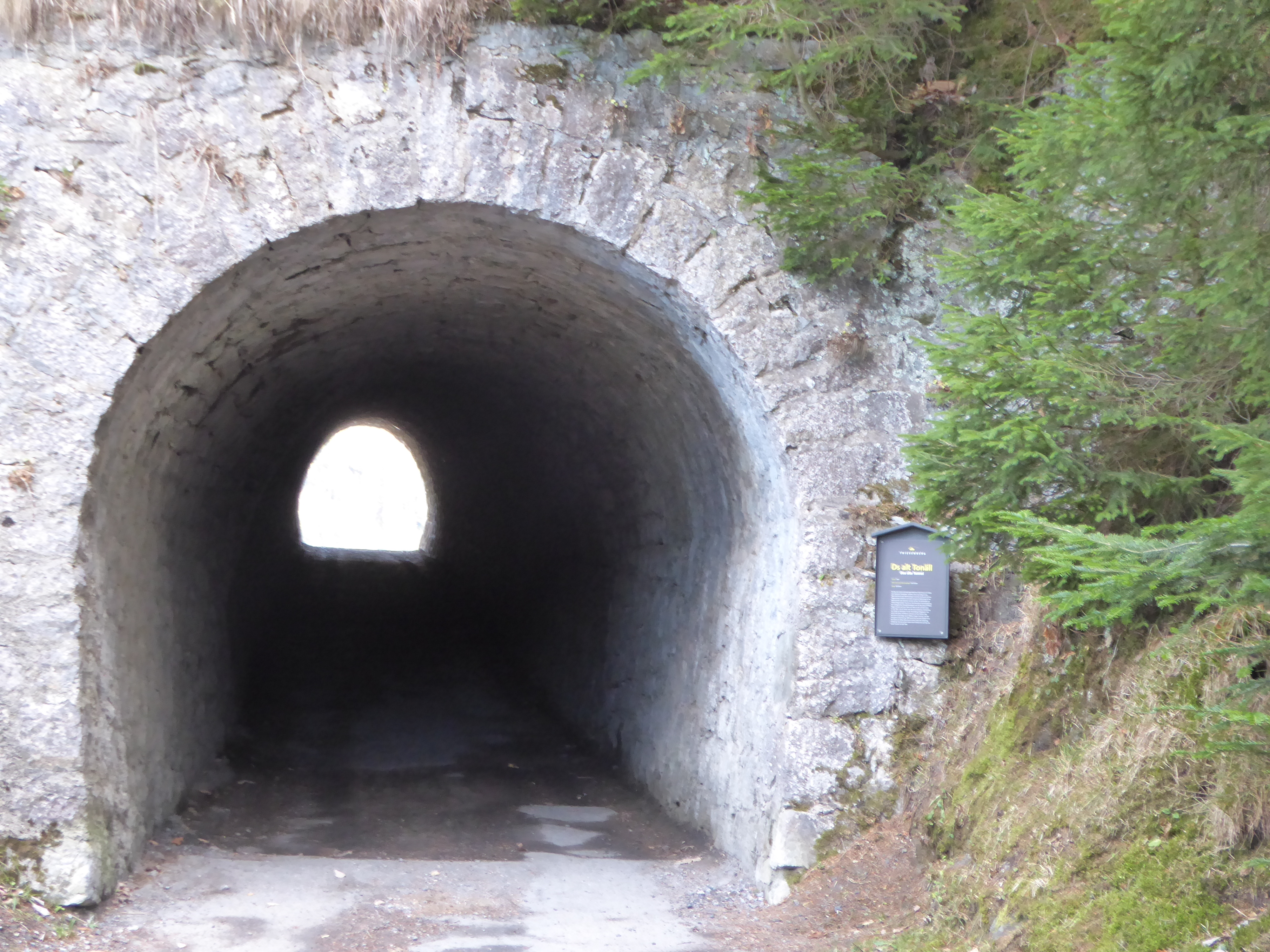 Blick in alten Tunnel bei Kulm FL aus Westen